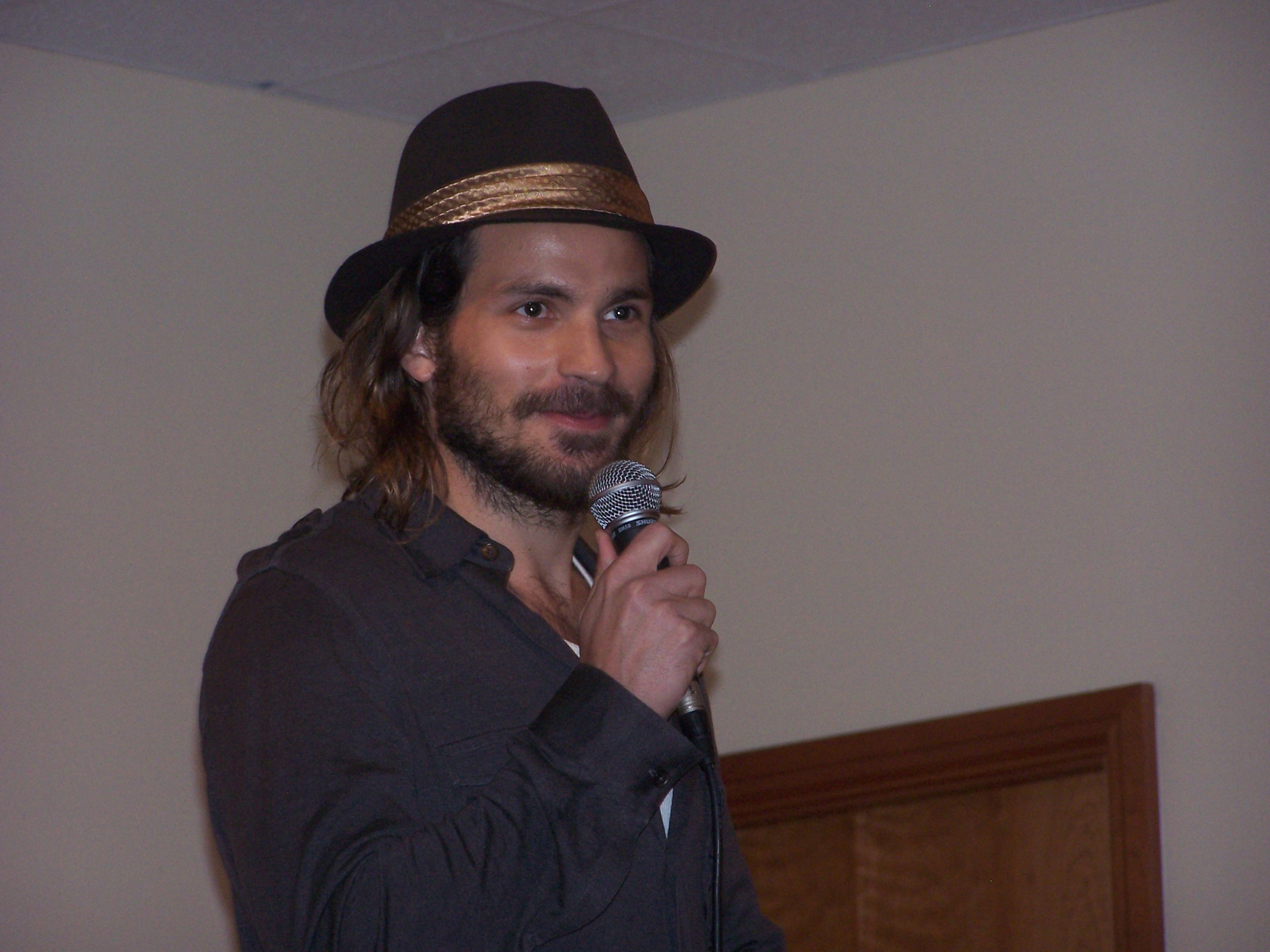 Santiago Cabrera